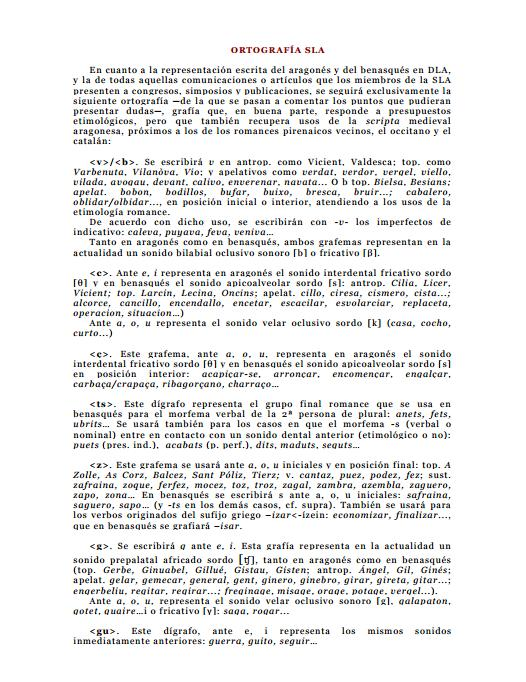 Aragonés: Primer pachina d'a ortografía d'a Sociedat de Lingüistica Aragonesa